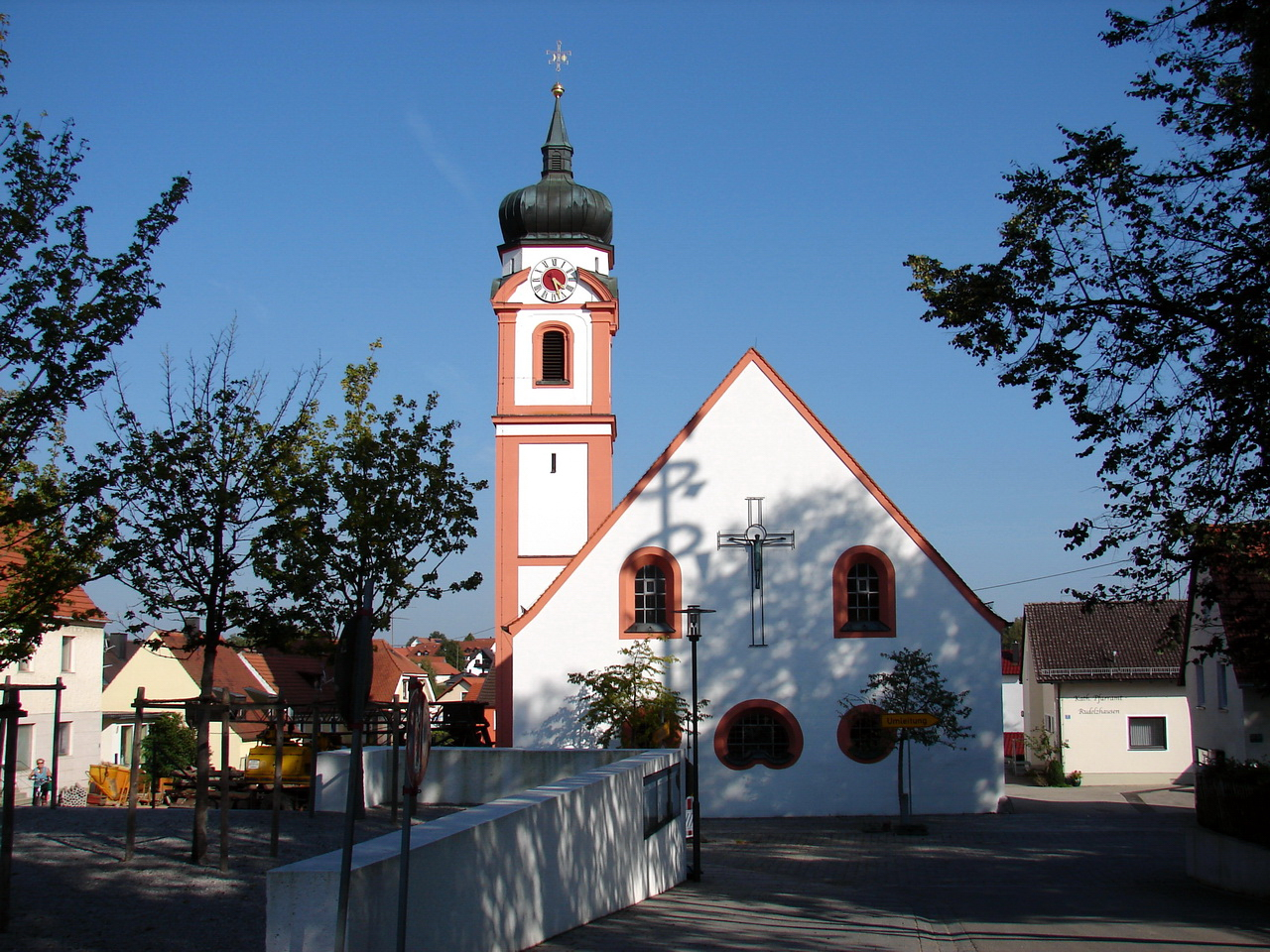 im Kern gotischer langgestreckter Saalbau mit eingezogenem Polygonalchor und angefügter Sakristei, barockisiert, um 1904/05 um neubarocken Turm erweitert; mit Ausstattung.